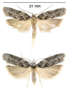 Antaeotricha arizonensis male (top), female (bottom)